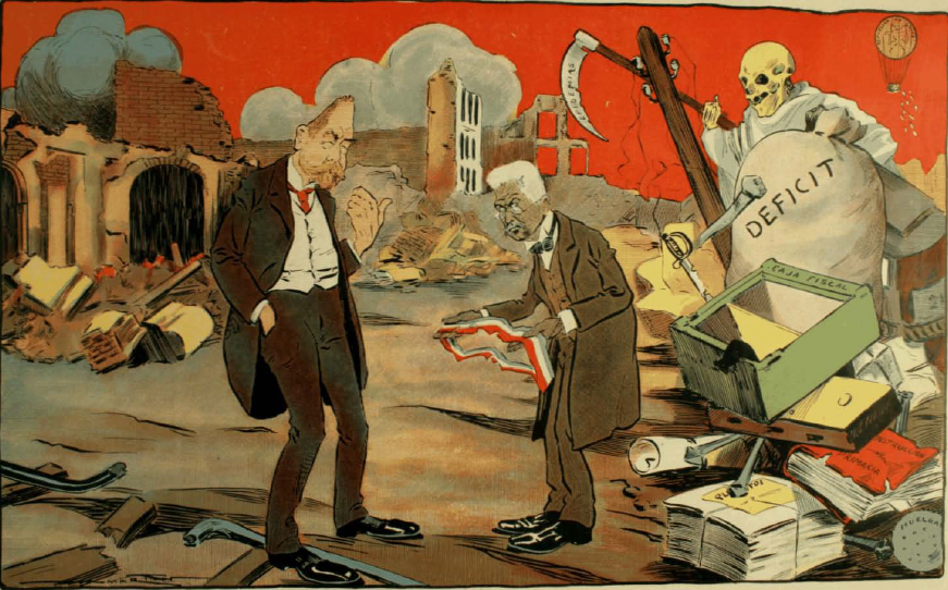 La entrega del pais: German Riesco: No se podrá usted quejar del estado floreciente en que l entrego el pais.